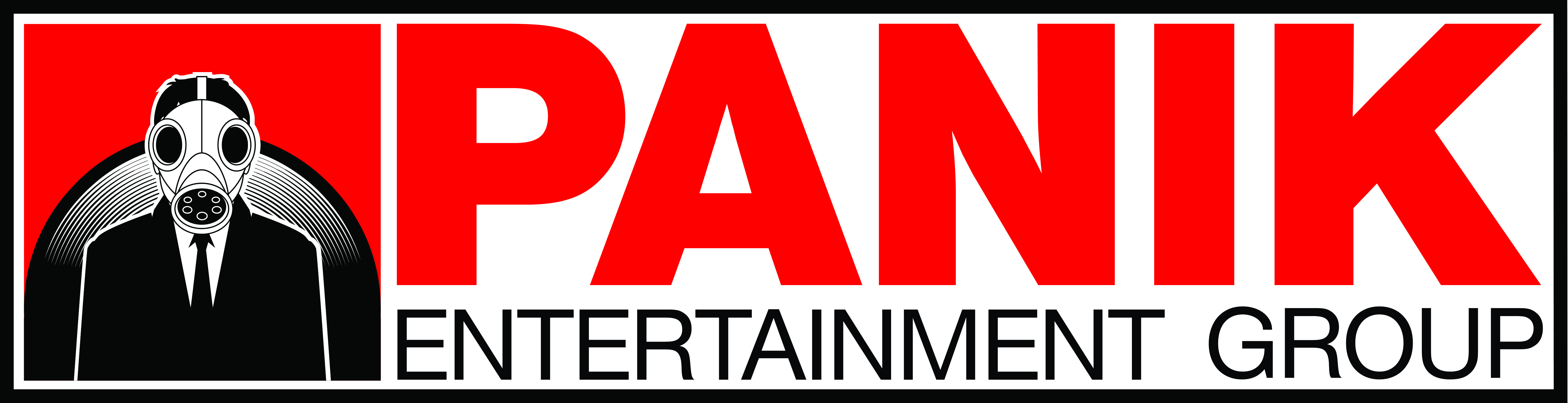 The Official Panik Entertainment Group logo